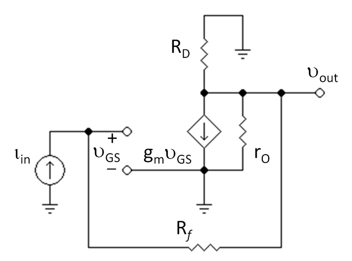 Transresistance amplifier